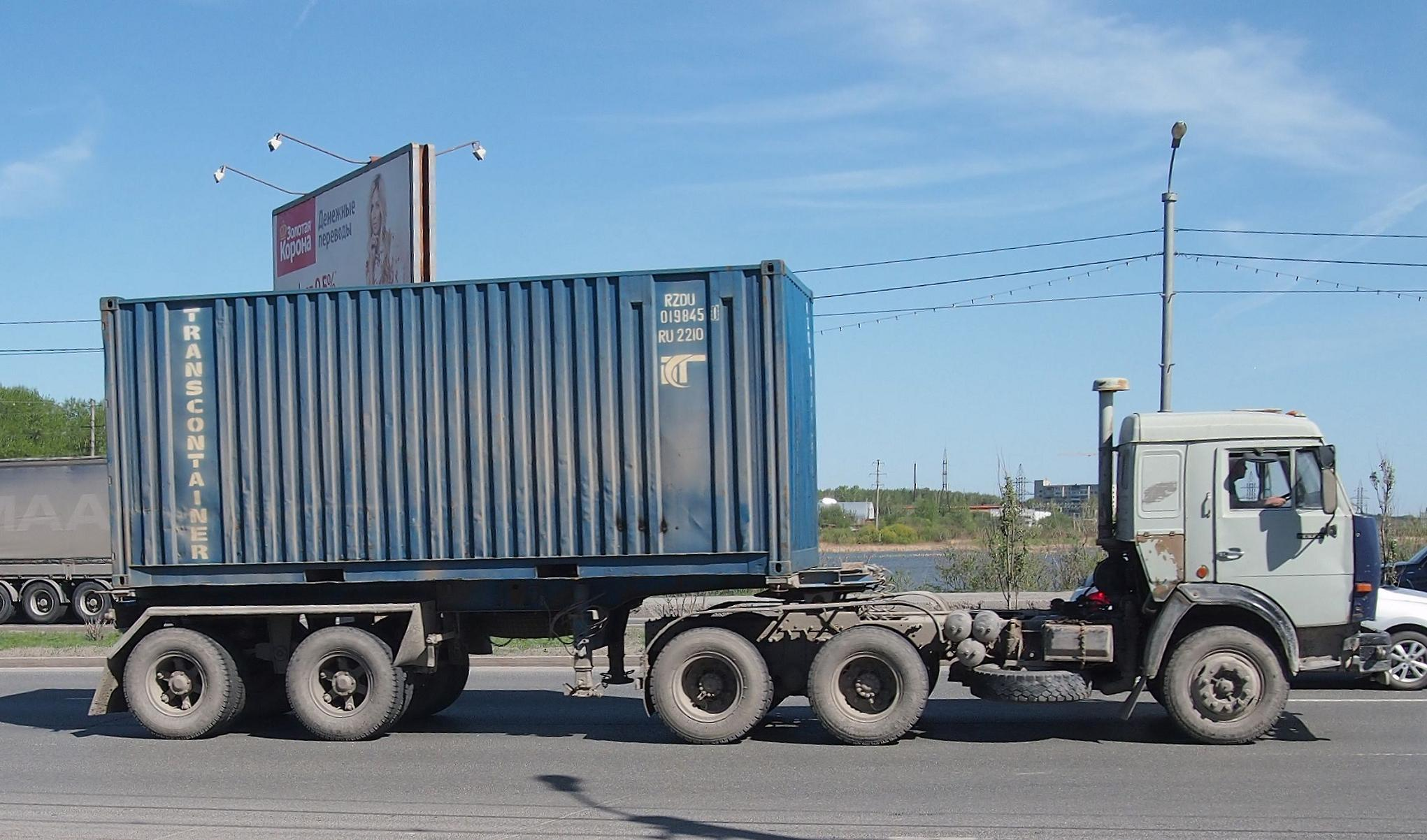 КАМАЗ-54115 с полуприцепом ЧМЗАП-99858, Тюмень